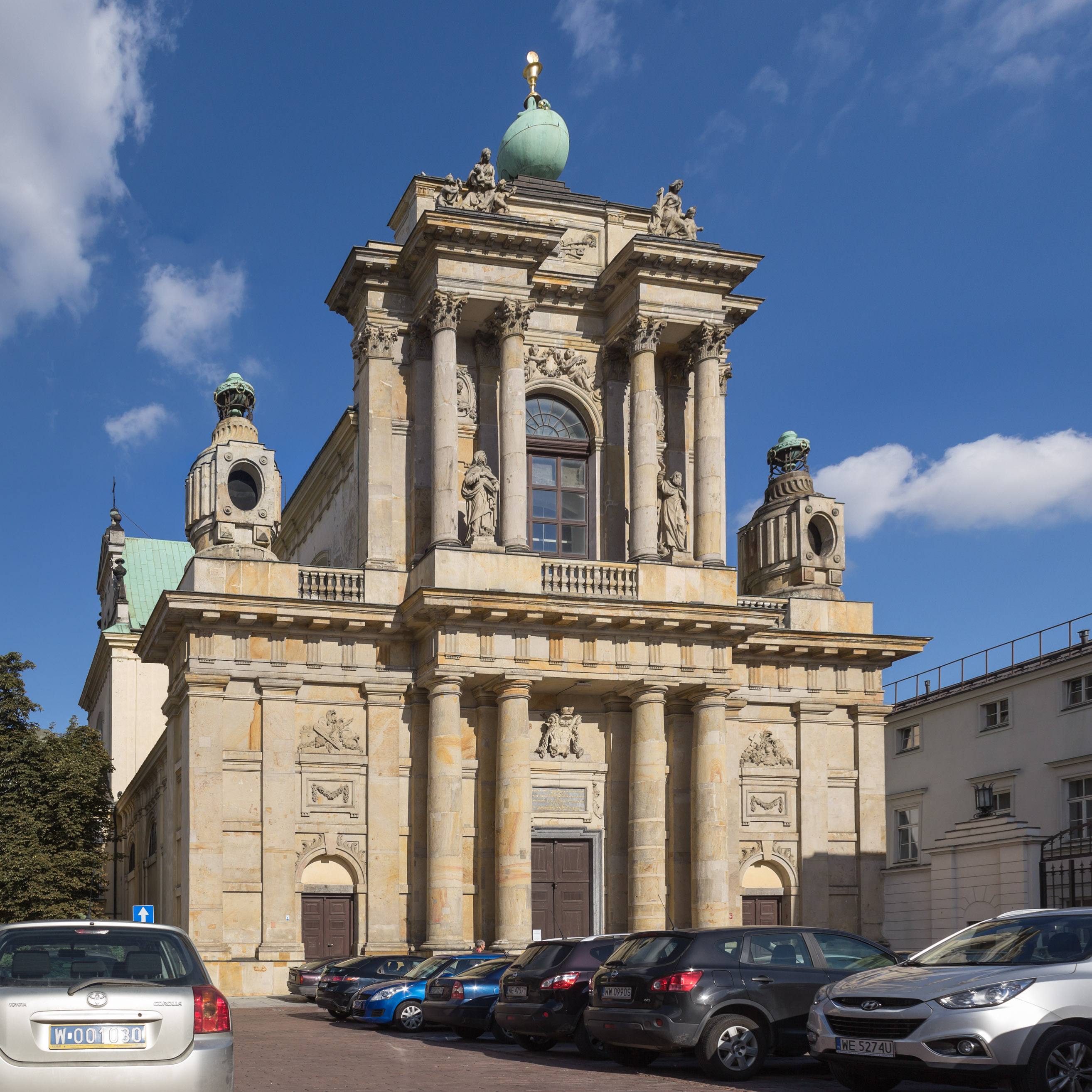 Kościół znajdujący się w Warszawie przy ul. Krakowskie Przedmieście 52/54. 07.1965.